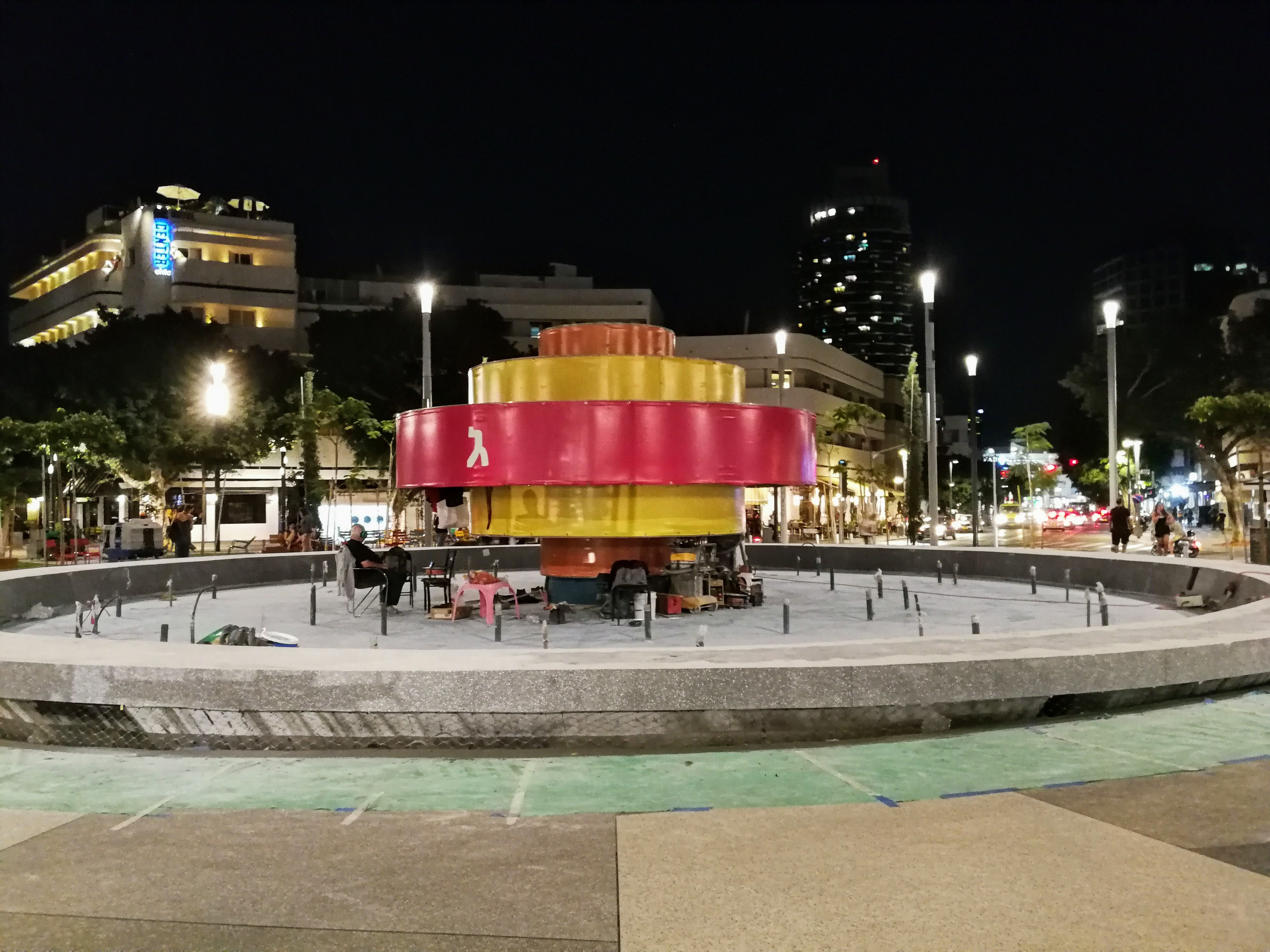 כיכר דיזינגוף החדשה לאחר ההנמכה, נובמבר 2018 כיכר צינה דיזנגוף קרויה על שם צינה דיזנגוף, רעייתו של ראש העיר הראשון, מאיר דיזנגוף. הכיכר נחשבה במשך שנים כאחד מסמליה של תל אביב. הכיכר הייתה חלק מתוכנית גדס, תוכנית מתאר לעיר תל אביב שהכין פטריק גדס, מתכנן ערים סקוטי. עיצוב הכיכר נעשה על ידי האדריכלית ג'ניה אוורבוך, שזכתה בתחרות העיצוב של הכיכר בשנת 1934. התכנון היה על פי קריטריונים של הסגנון הבינלאומי, שהיה הסגנון האדריכלי המרכזי בתל אביב בתקופה זו.